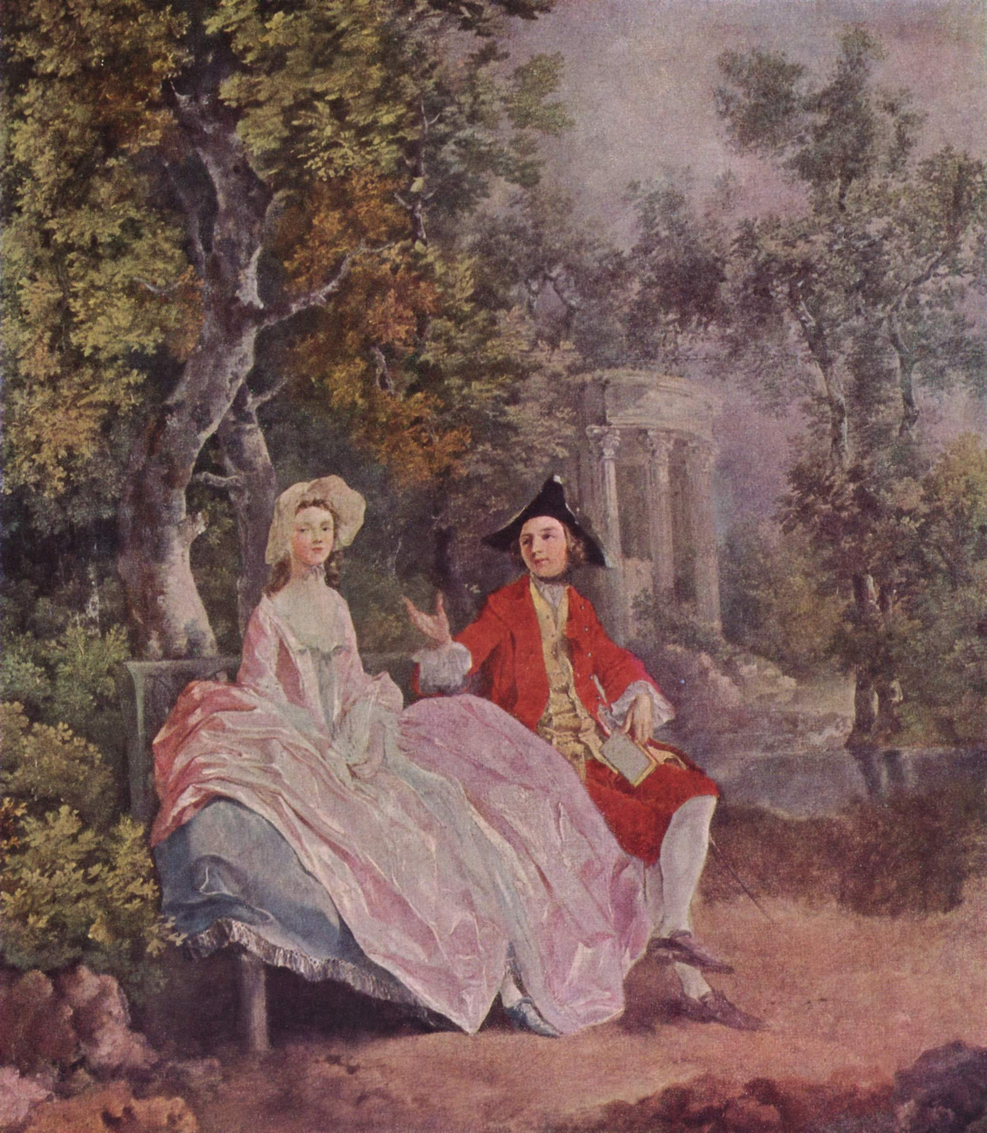 Portrait de l'artiste et de sa femme Margaret à l'époque de leur mariage en 1746